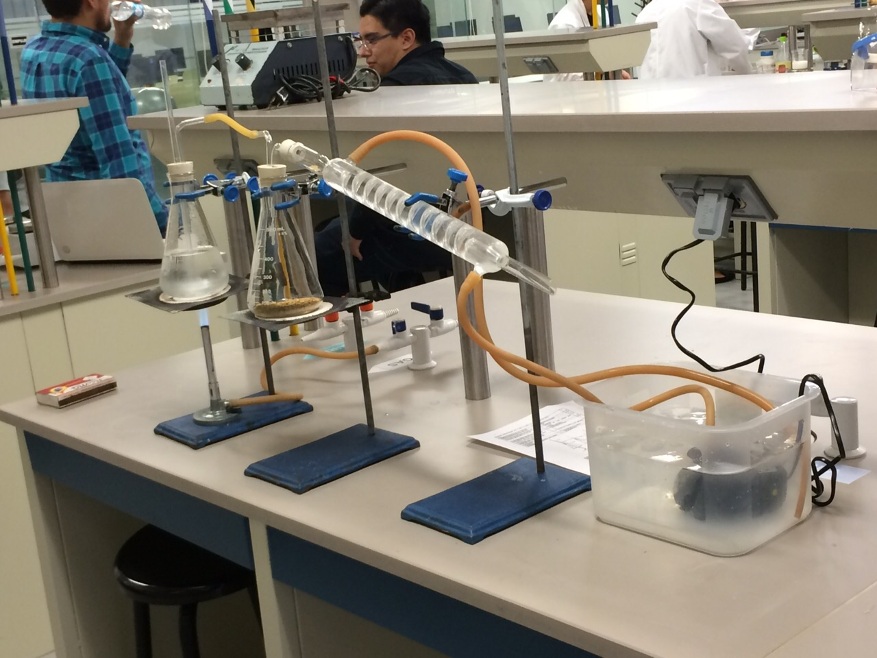 Extracción de esencia de semillas de Neem por arrastre de vapor con aparato de destilación. Laboratorios Tecnológico de Monterrey, Campus Ciudad de México